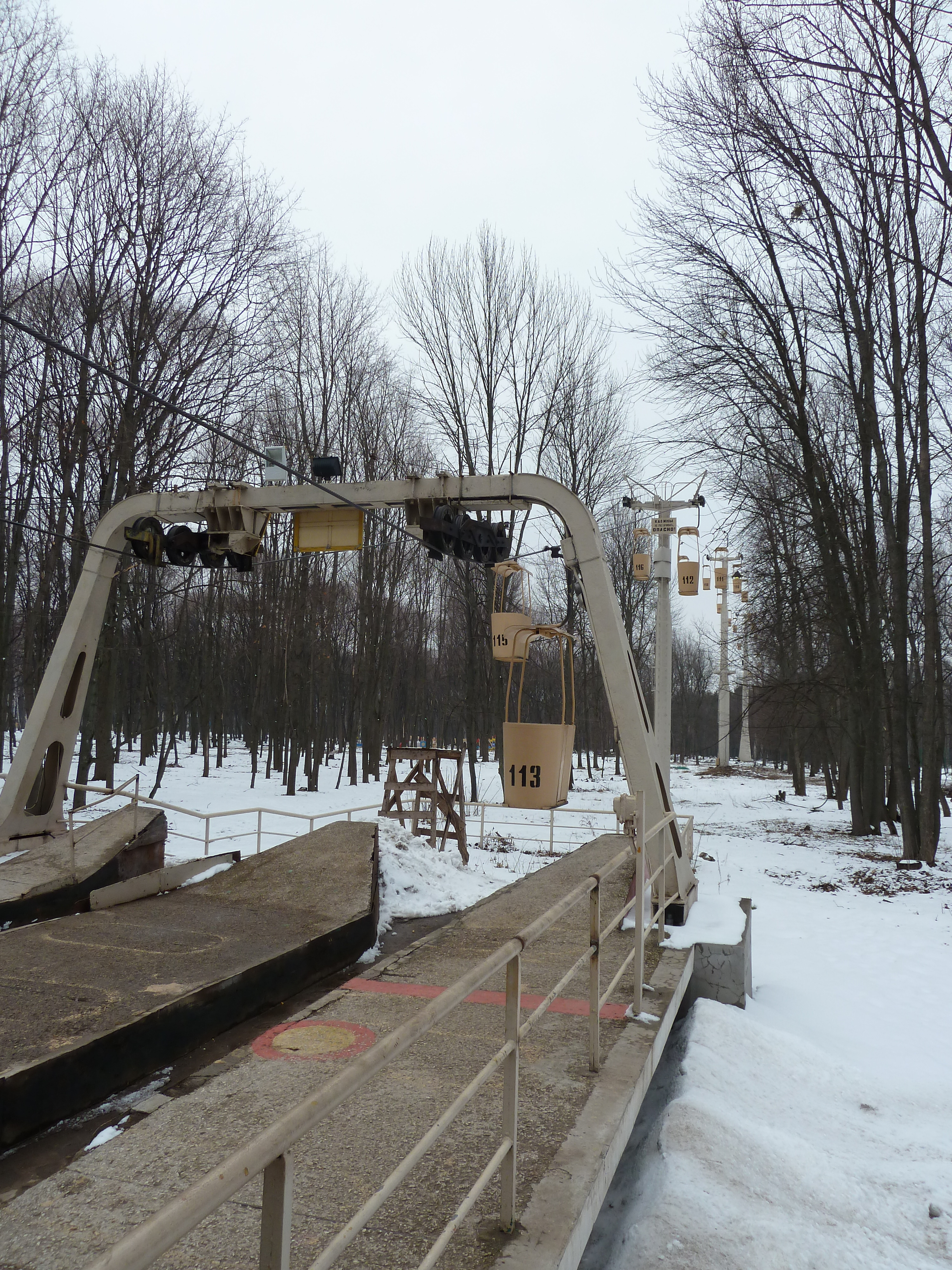 Харьковская канатная дорога